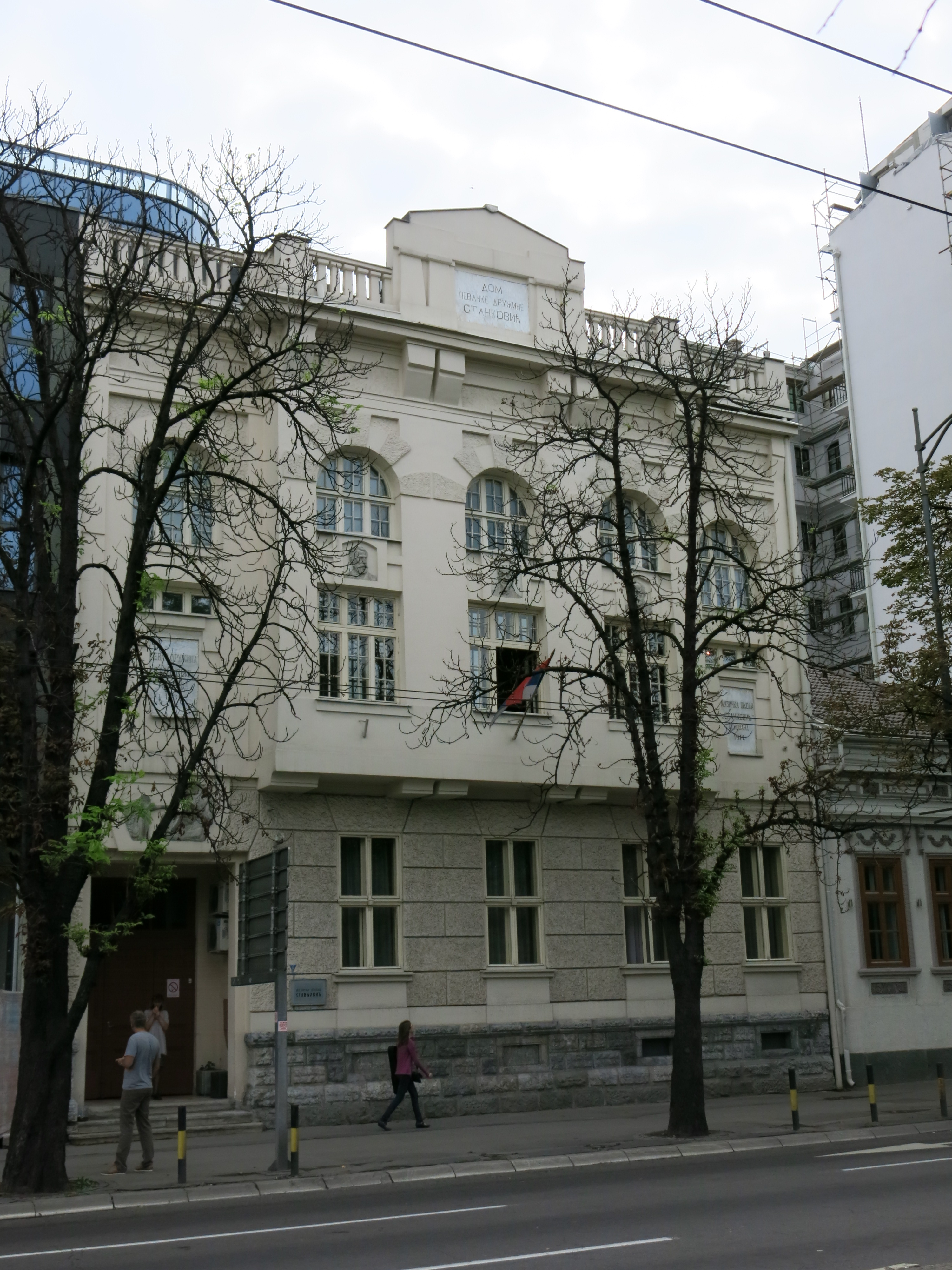 Музичка школа „Станковић“